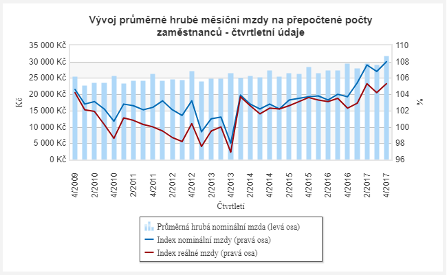 Vývoj průměrné mzdy v České republice za období 4/2009 - 4/2017.